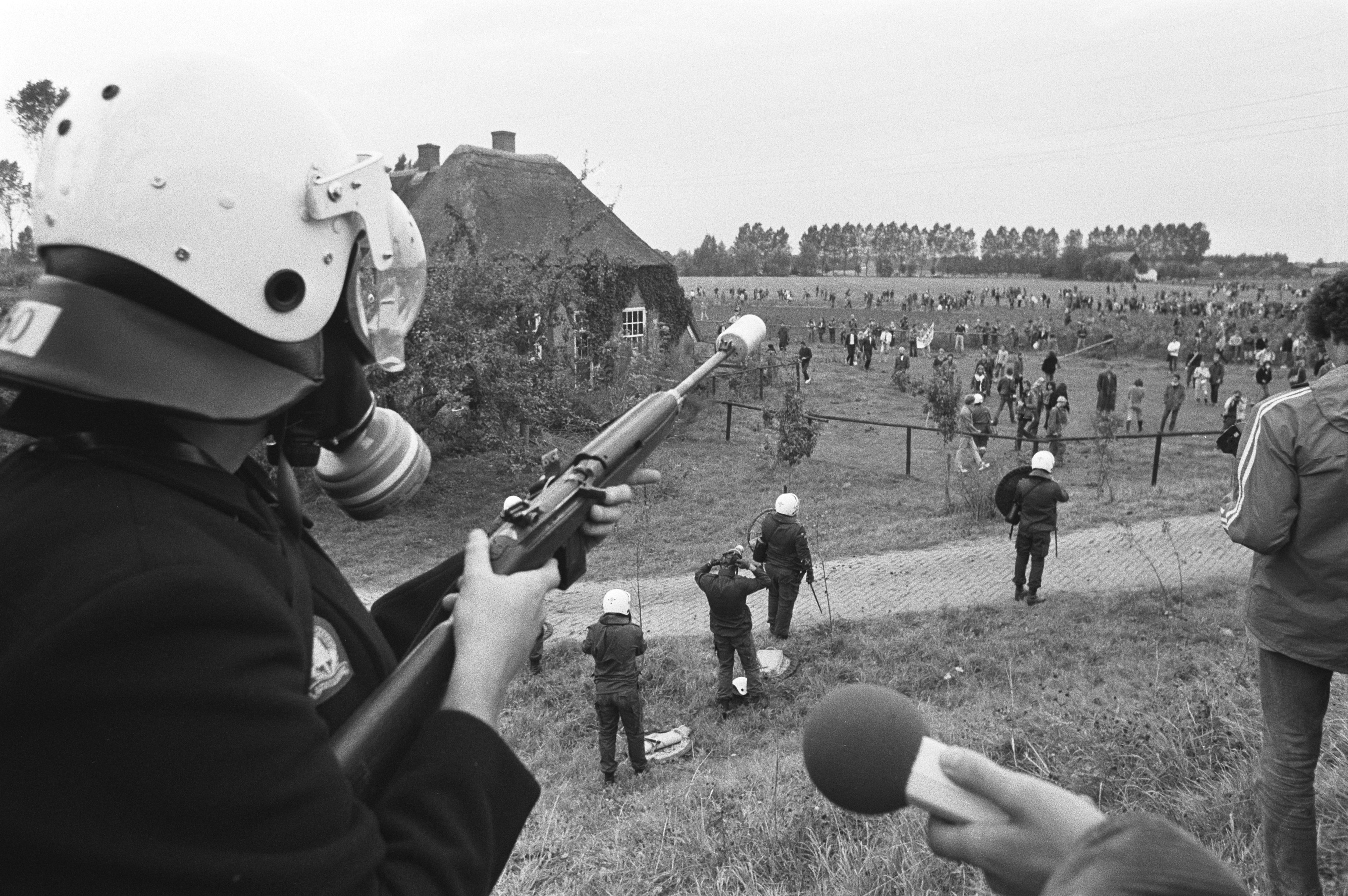 Blockade und Demonstration gegen das Kernkraftwerk Dodewaard. Die „Mobiele Eenheid“ schießt mit Tränengasmunition.